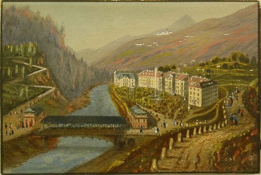 Vulpera (zu Tarasp gehörig), Stahlstich um 1840